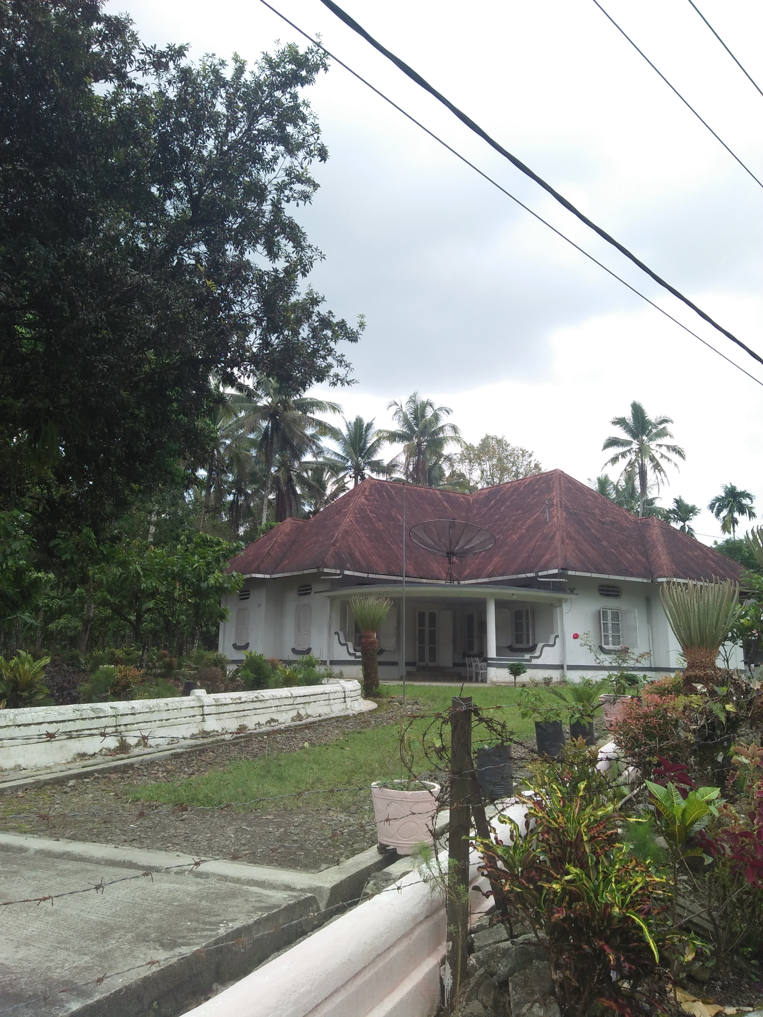 Rumah peninggalan dr. M. Djamil